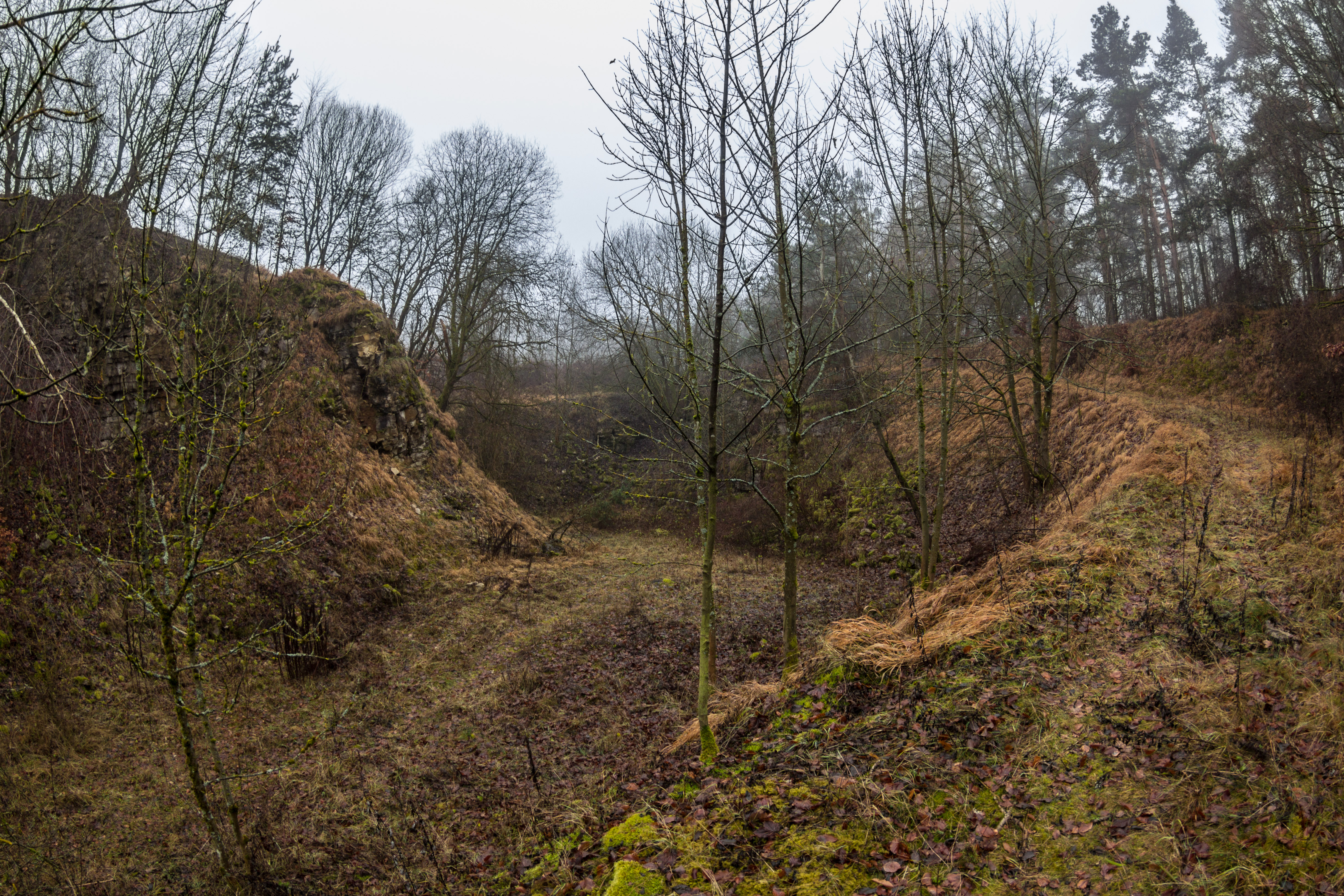 Steinbruch, Kalkstein, Unterrieden, Geotop